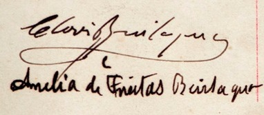 Autógrafos do jurista brasileiro Clóvis Beviláqua e da esposa Amélia de Freitas